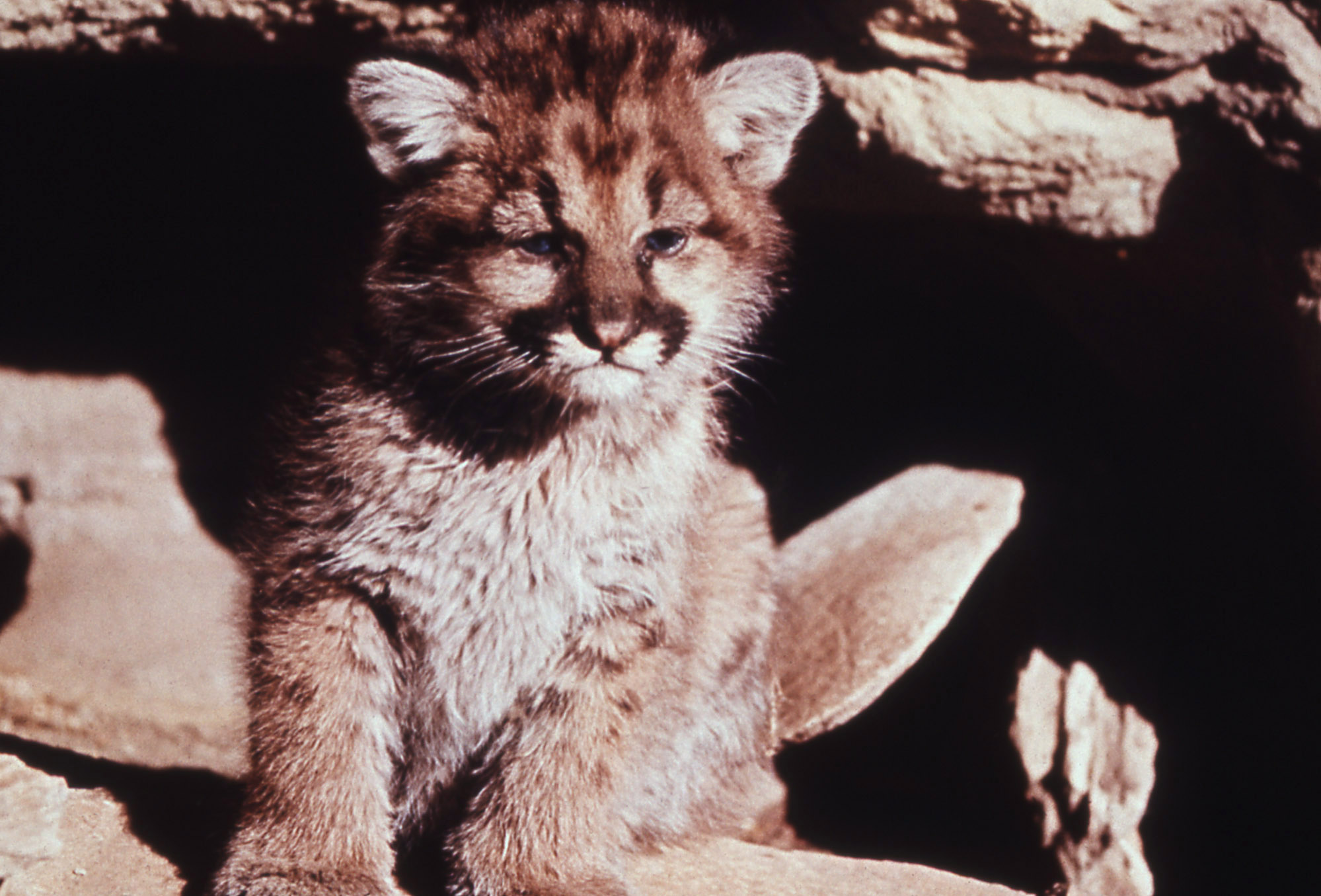 moutain lion cub